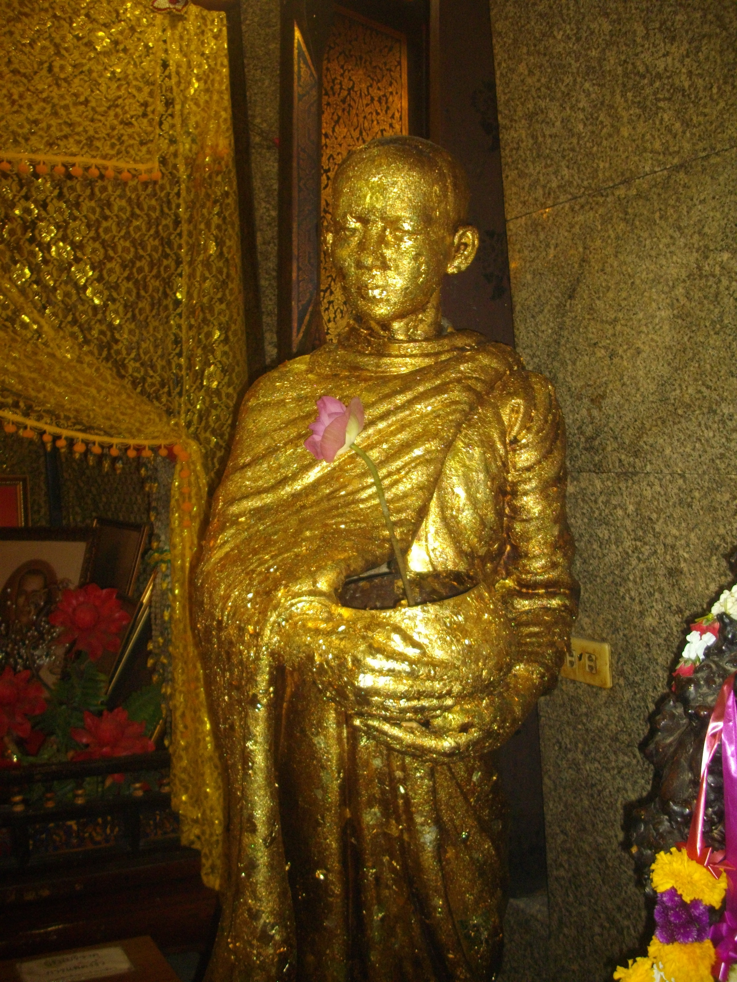 ประติมากรรมสมเด็จพระเจ้าตากสินมหาราชในเพศภิกขุภาวะ ณ วิหารสมเด็จพระเจ้าตากสินมหาราช วัดอินทาราม (วัดบางยี่เรือนอก หรือวัดบางยี่เรือใต้) แขวงบางยี่เรือ เขตเทอดไทย กรุงเทพมหานคร